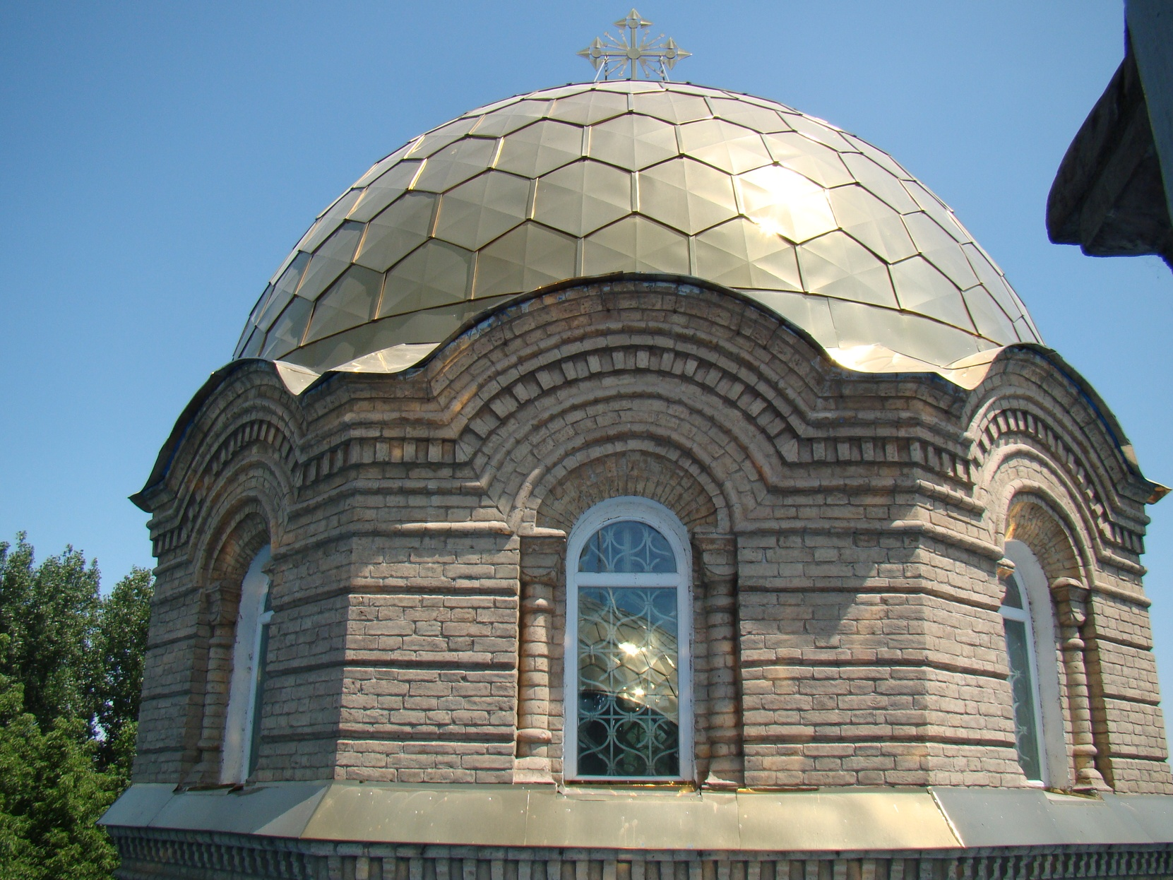 Свято-Казанский храм иконы Божией Матери в Кызылорде. Главный купол.